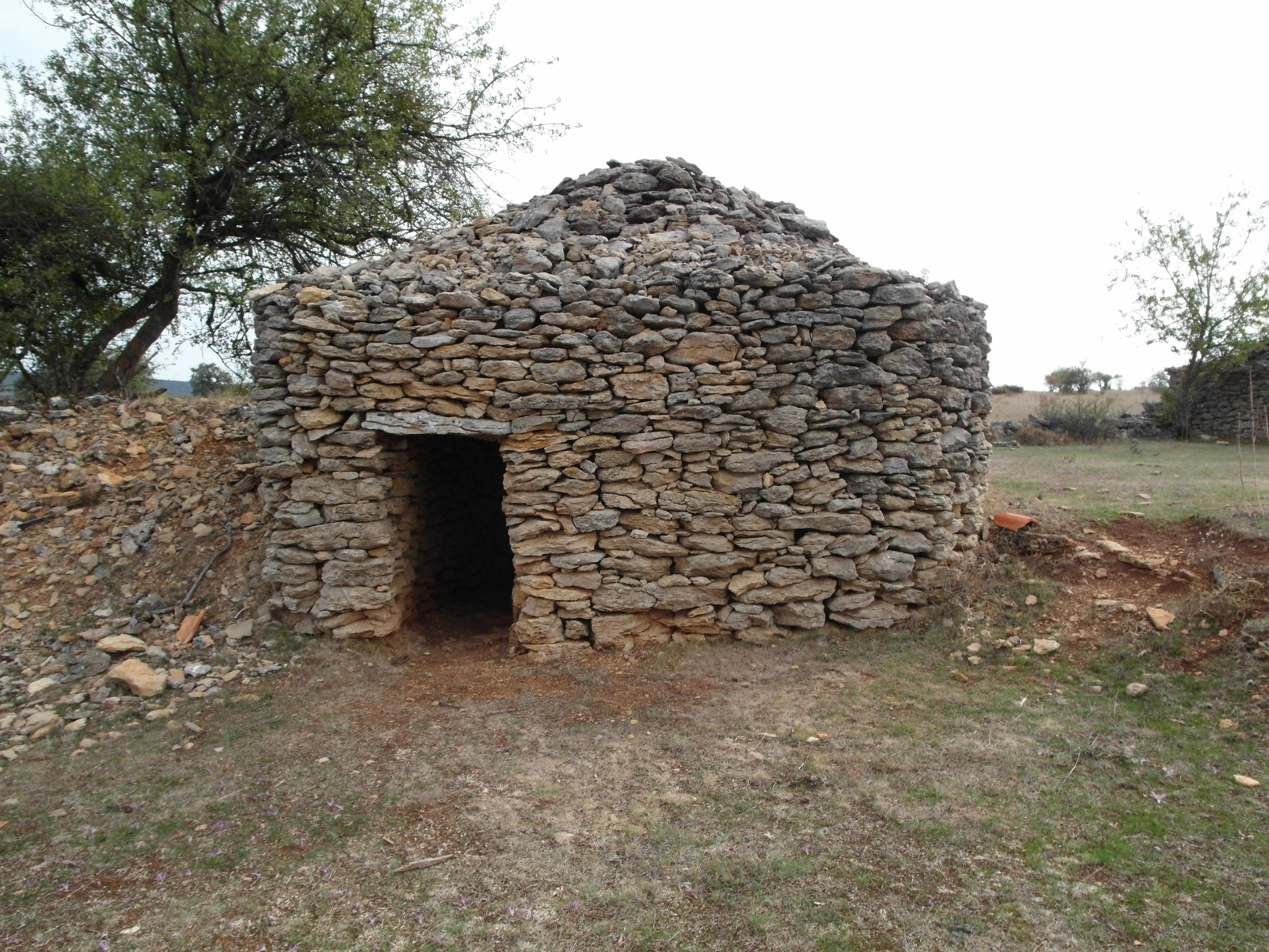 Orbaneja del Castillo, Burgos.